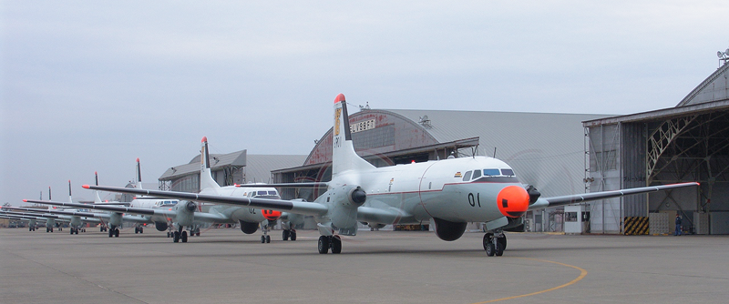 ys-11-ta